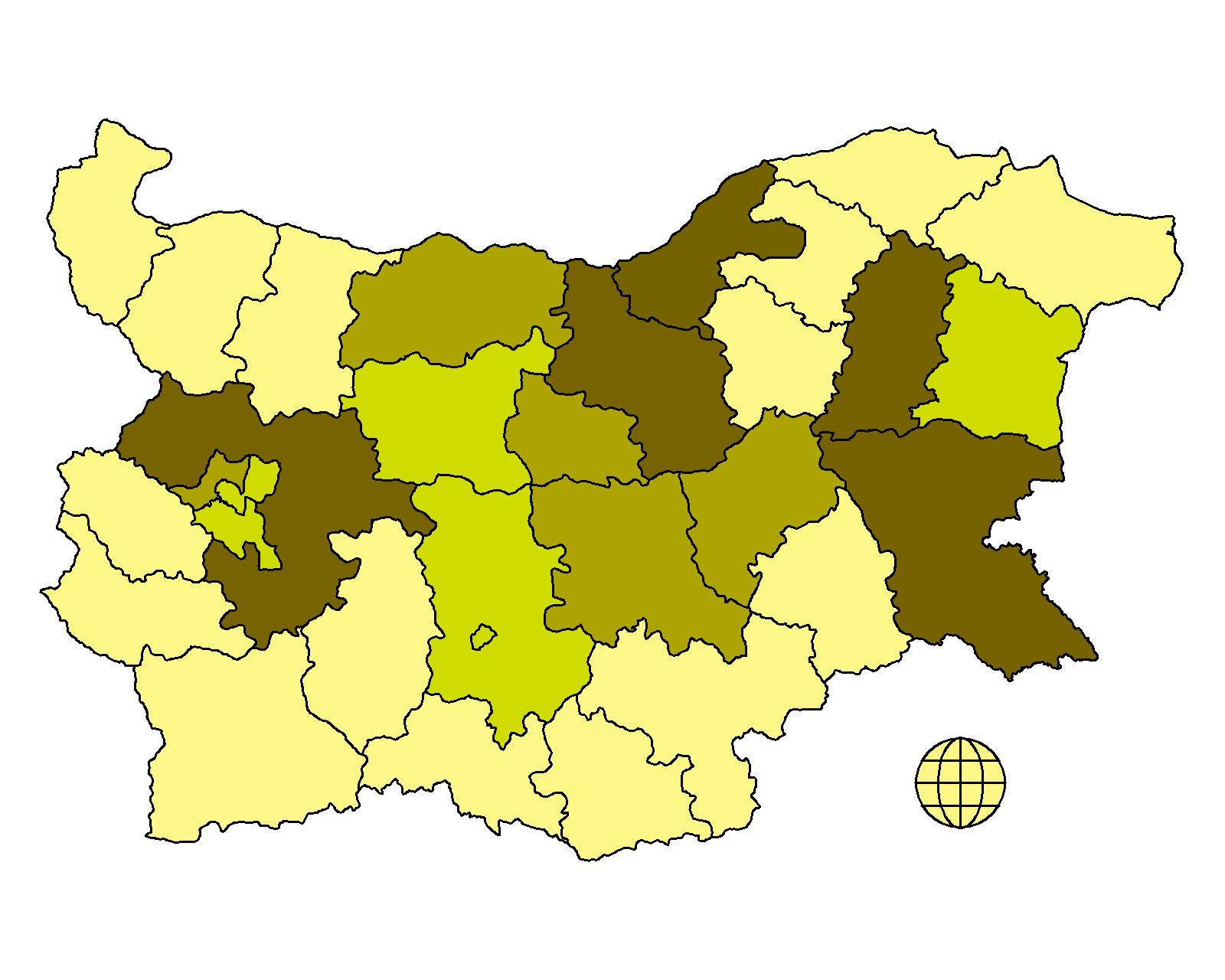 Гласуване по райони за Национален съюз Атака на парламентарните избори през 2005. Всеки от цветовете съответства на приблизително 1/4 от подадените гласове По тъмният цвят съответства на получен по-голям процент от гласовете